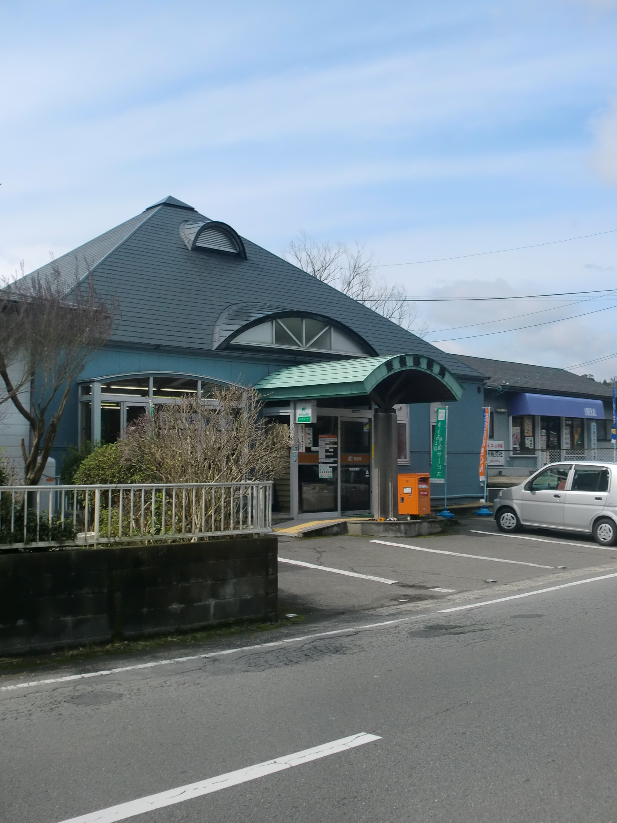 鹿児島市にある東俣（ひがしまた）郵便局